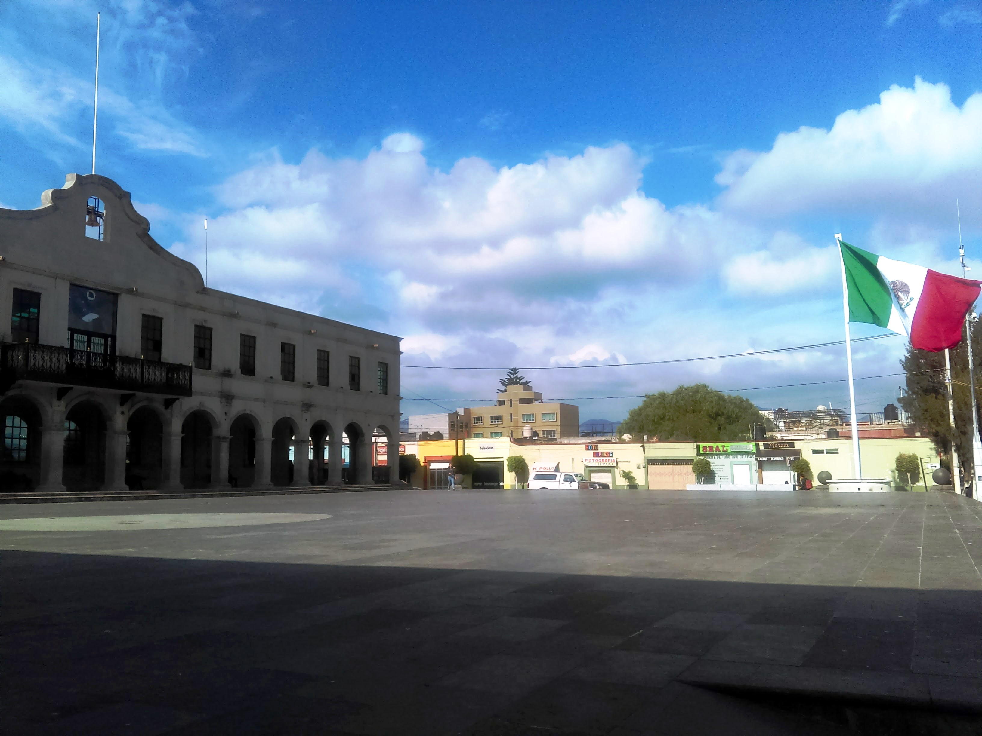 Plaza Constitución in Actopan, Hidalgo.